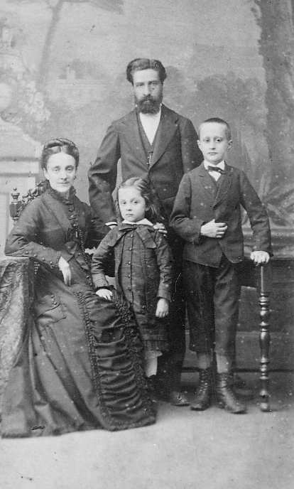 Edouard Rabaud en famille